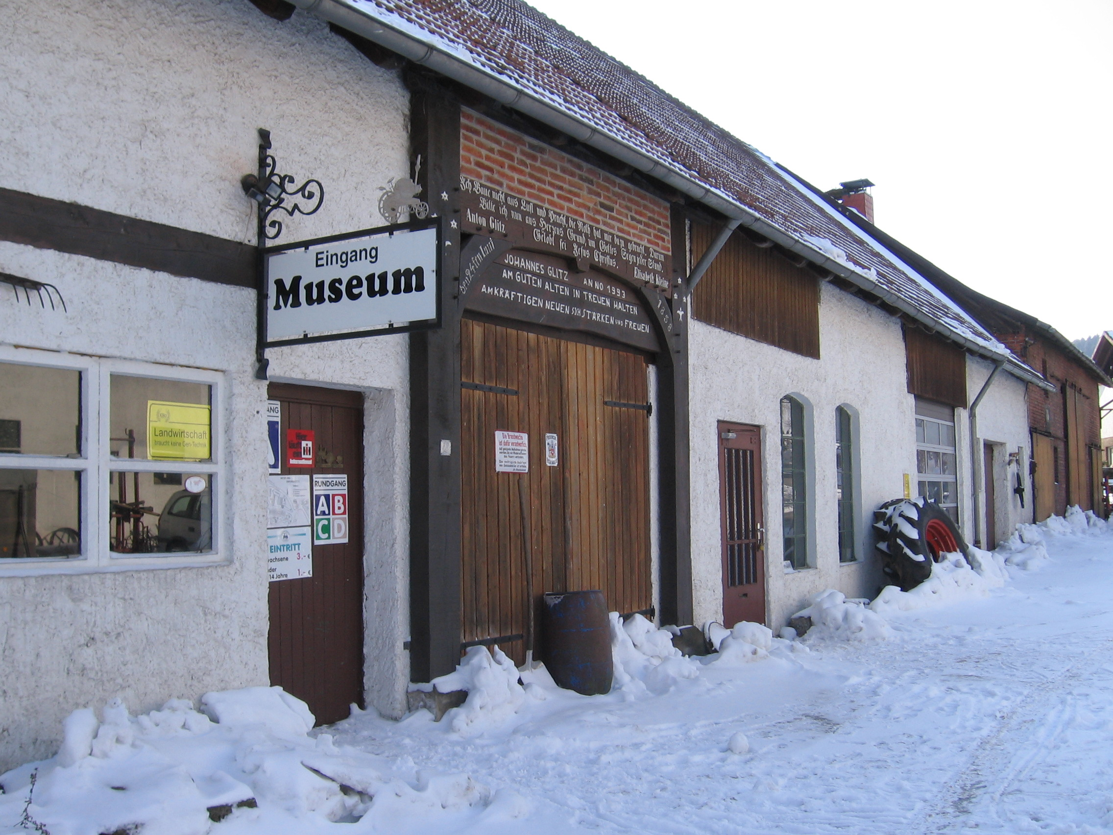 Traktorenmuseum im nordrhein-westfälischen Dorf Kempen bei Feldrom.